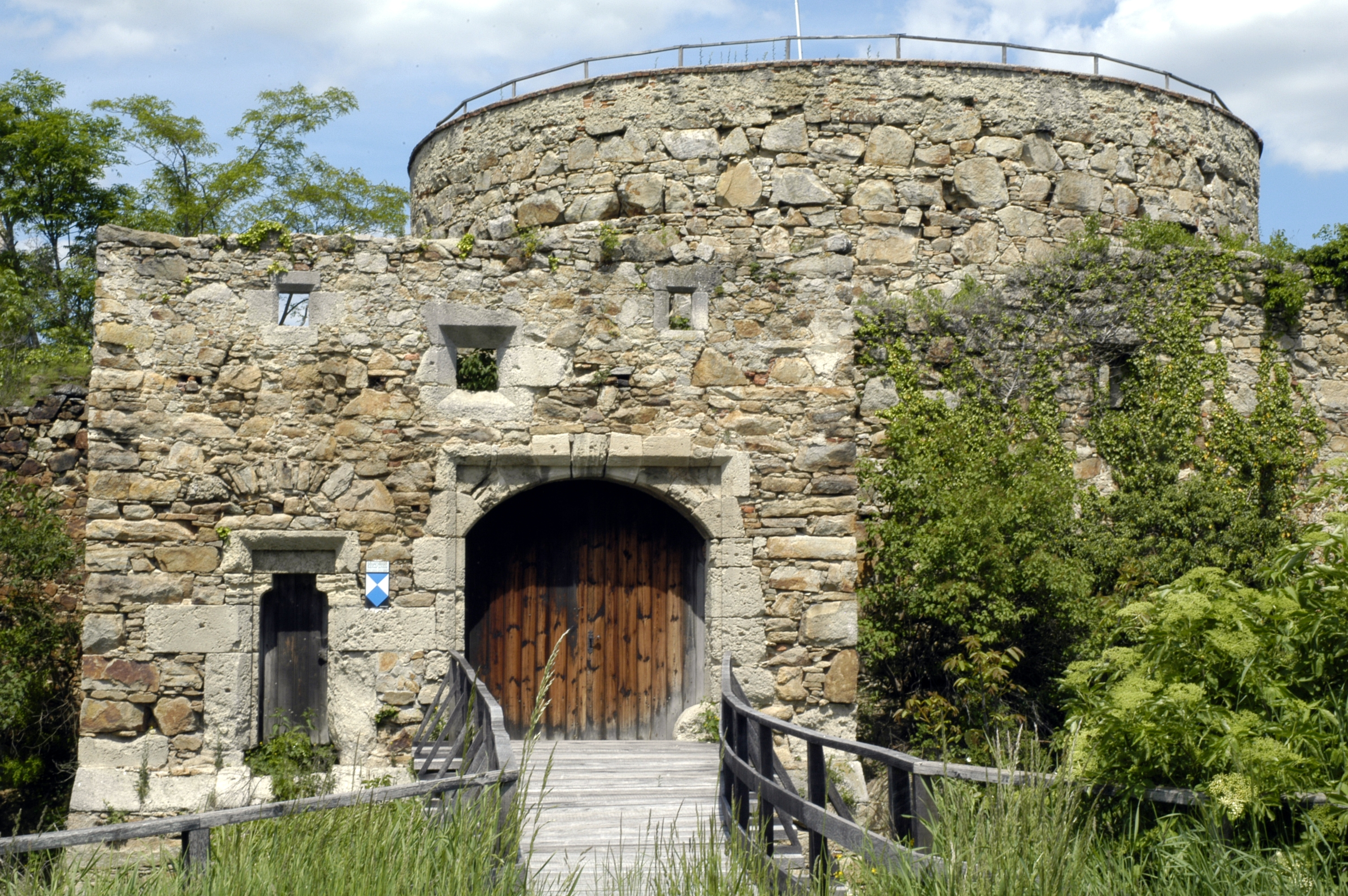 Befestigungsanlage im Bereich des Hungerturmes (Schloss Schrattenthal)